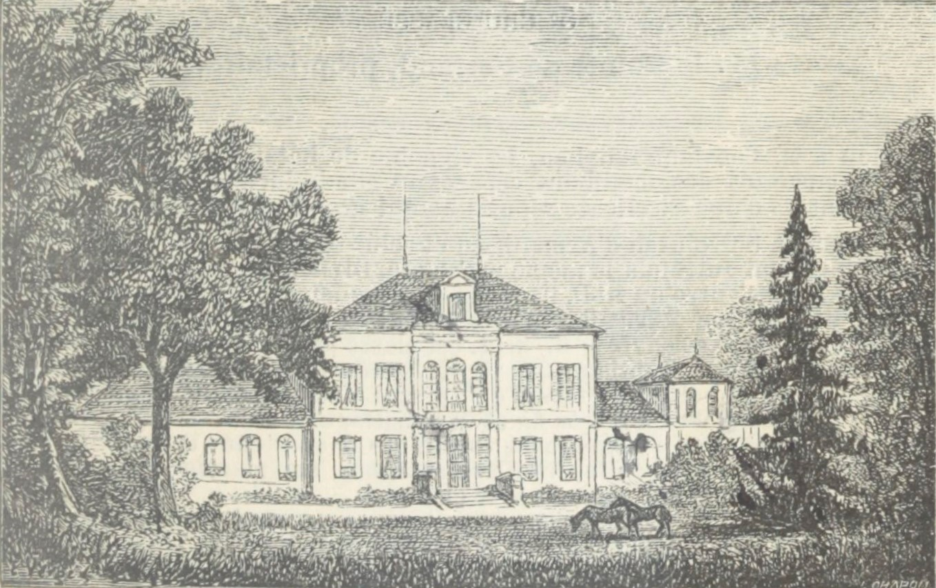 Illustration du Château Batailley dans l'ouvrage Bordeaux et ses vins (7ème édition) de Charles Cocks et Edouard Féret publié en 1898